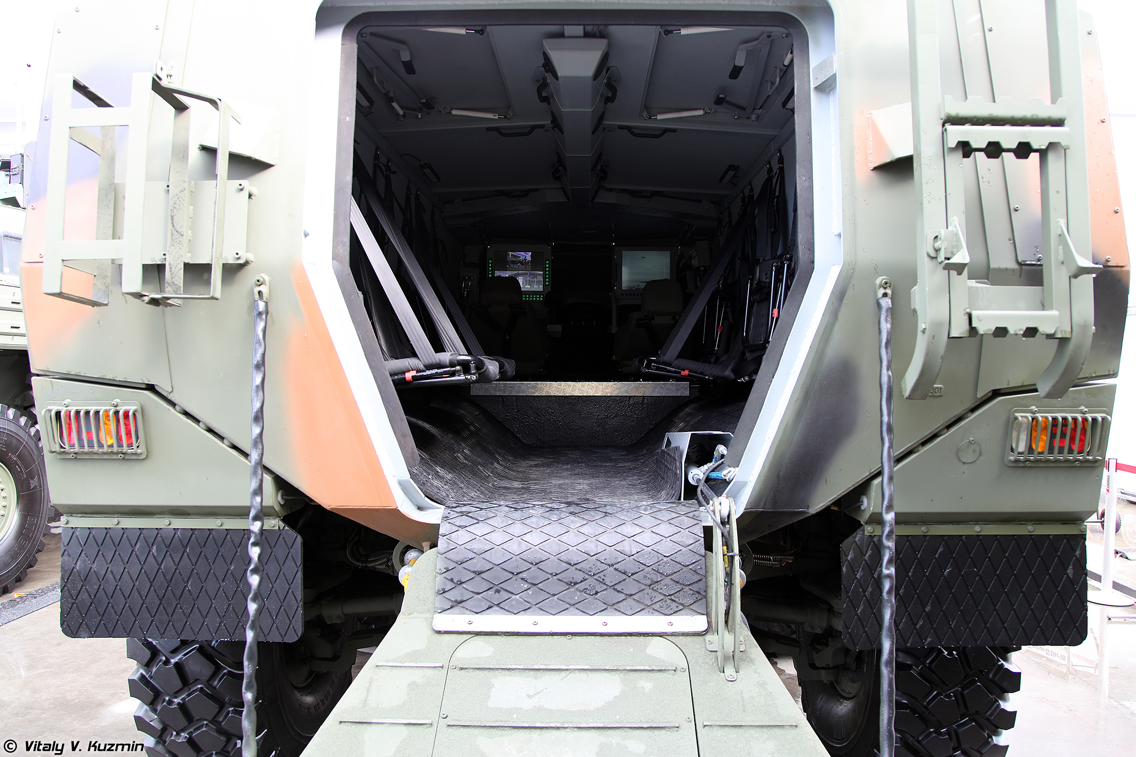 Бронетранспортер Барыс 8х8 (Barys 8x8 armored personnel carrier)